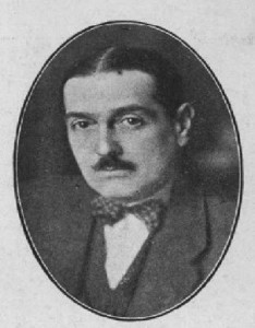 Alberto Cruz Montt (Valparaíso, 1879 - Santiago, agosto1​ de 1955), fue un arquitecto y docente chileno de estilo neoclásico.